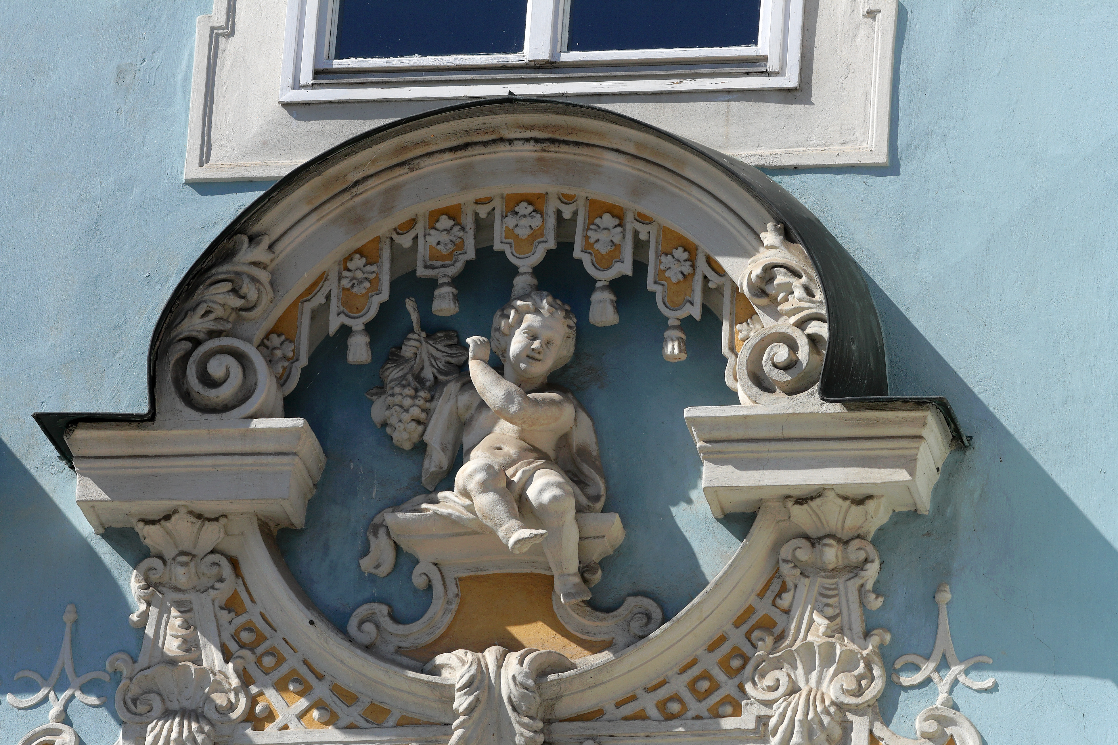 An der Fassade des Steyrer Sternhauses befinden sich über den Fenstern des zweiten Stockes Allegorien der fünf Sinne. Hier das zweite Feld von links mit dem Thema „Geschmack“